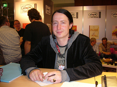 Joerg Hartmann während einer Signierstunde am Stand der Ehapa Comic Collection auf dem Comicsalon Erlangen 2008.